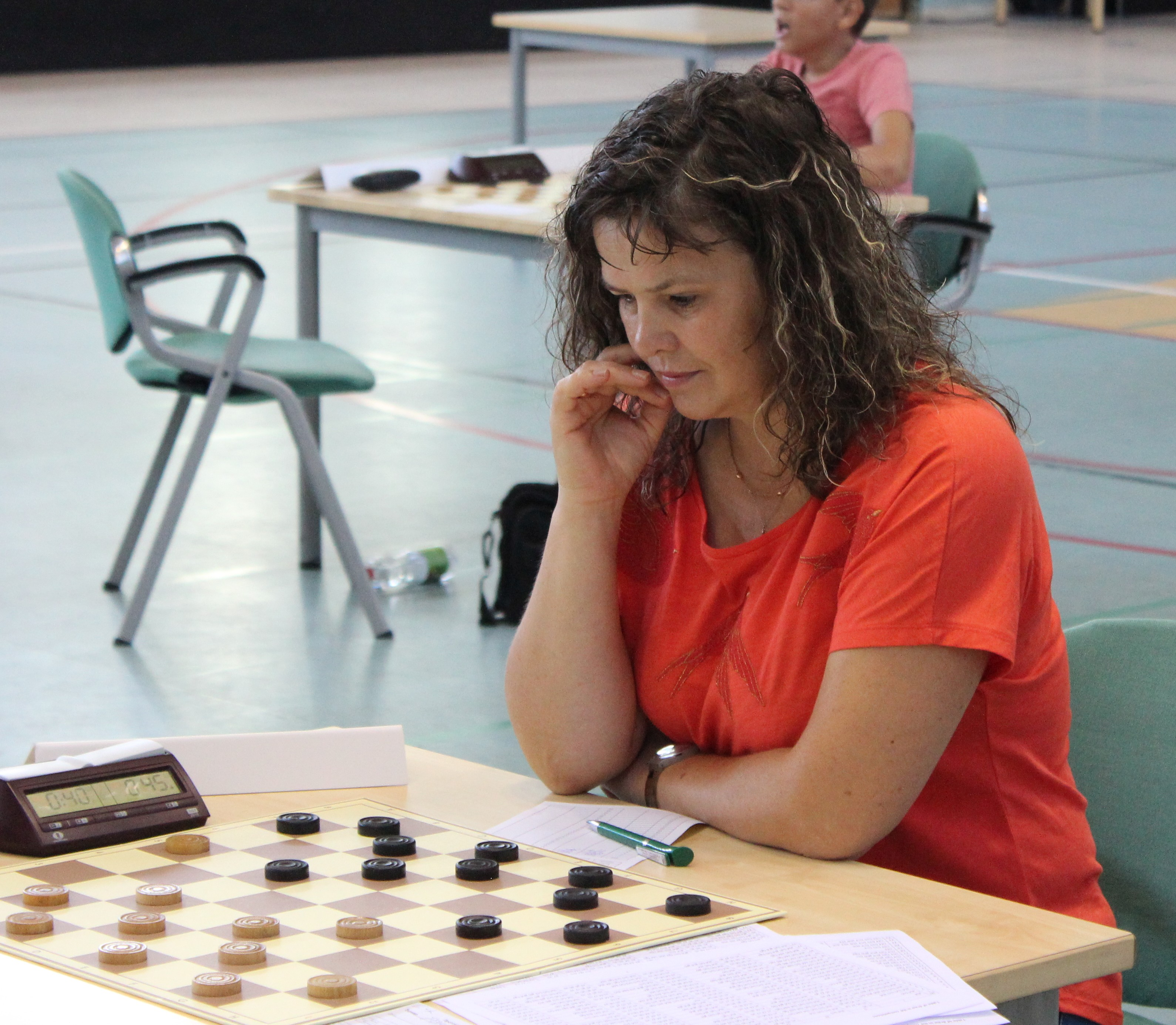 Antra Valnere mängimas rahvusvahelisel kabeturniiril Jõgeva-2017